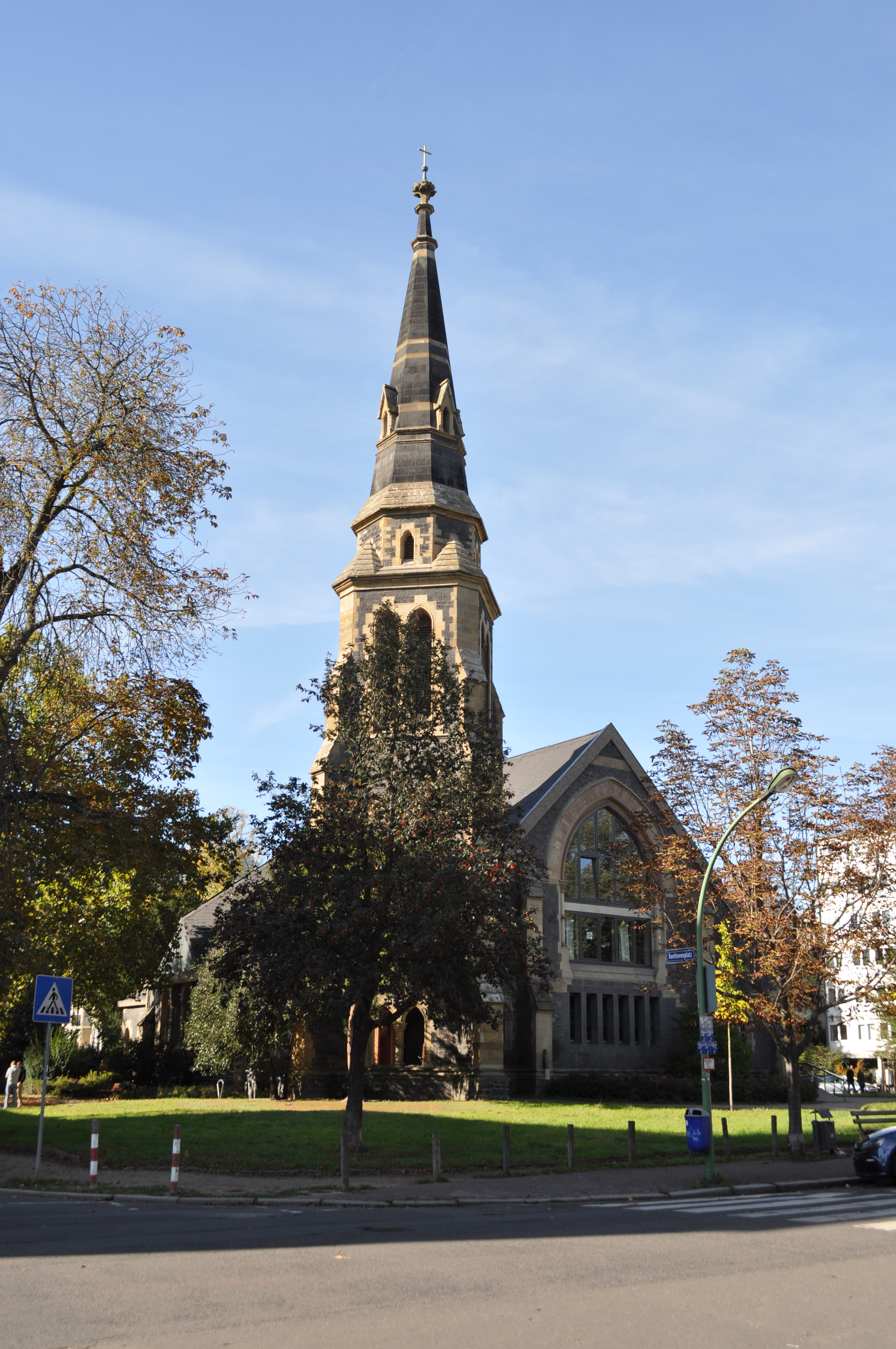 Christuskirche in Frankfurt, Beethovenplatz. Neubau der im Zweiten Weltkrieg zerstörten Christuskirche im damals noch kaum bebauten Frankfurt-Westend, früher Zionkirche genannt. Erbaut 1883, damaliger Stifter Emil Moritz von Bernus (1843-1913)